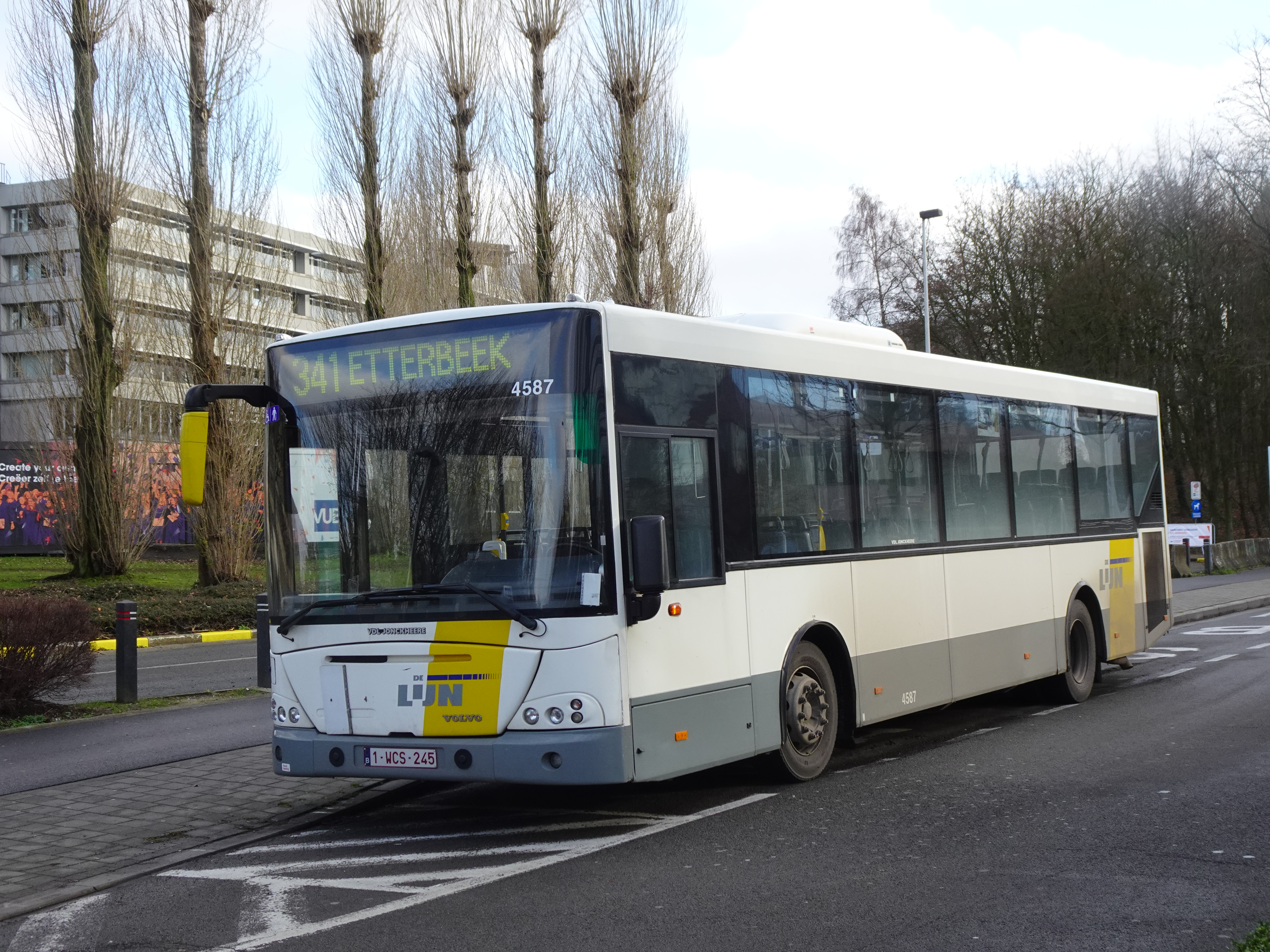 Jonckheere Transit 2000 garé au terminus de la ligne 341. Cet autobus, livré en 2005, possède un châssis Volvo B7RLE.